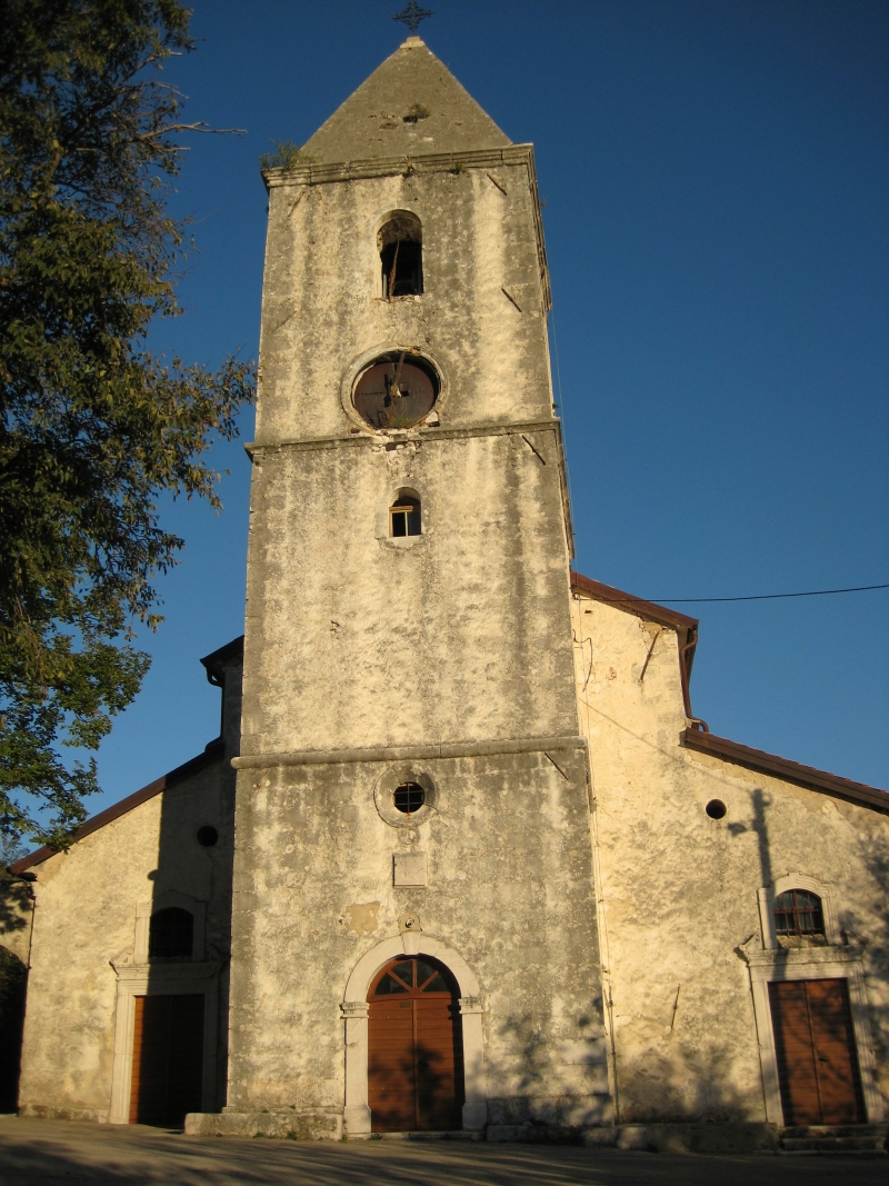 Crkva Svetog Dujma, Drivenik, Croatia